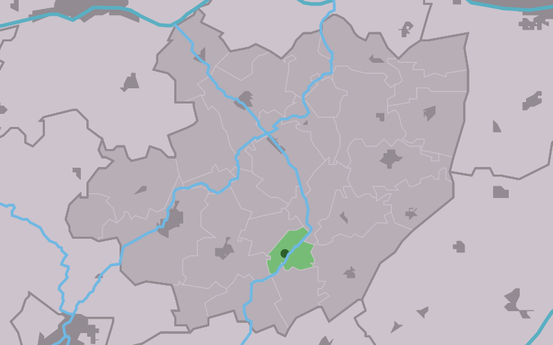 Kaartsje fan himrik fan Rien